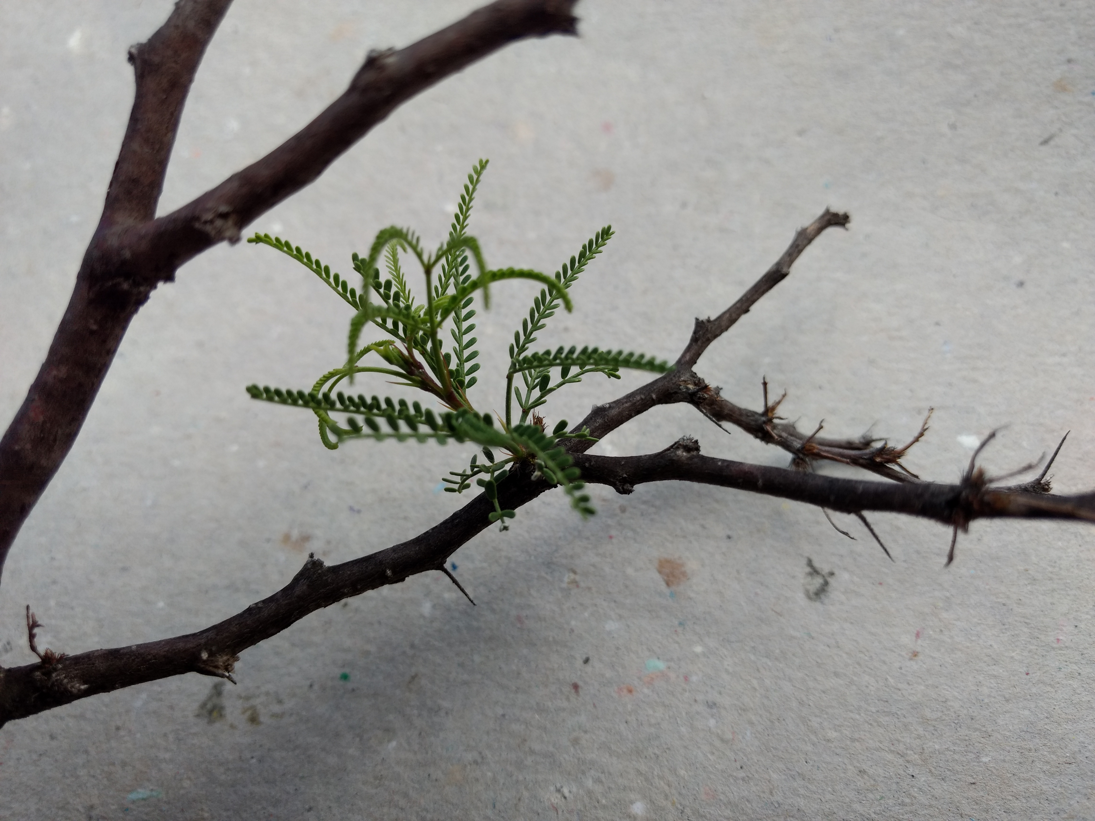 Hojas compuestas bipinnadas